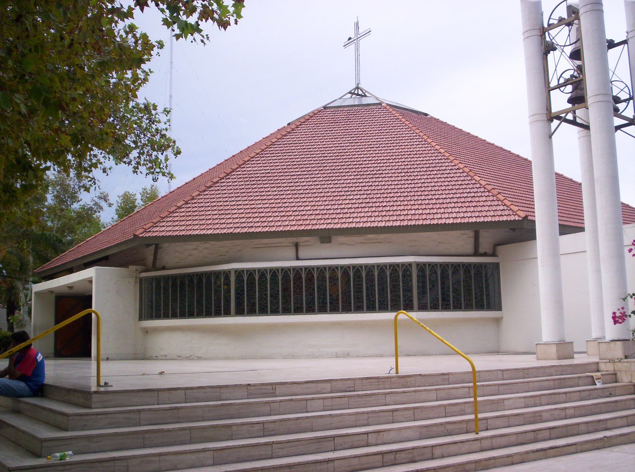 Vista a la iglesia de la Mercedn ubicada en la ciudad argentina de San Juan